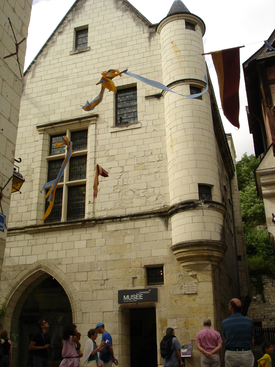 musée de chinon (france 37)